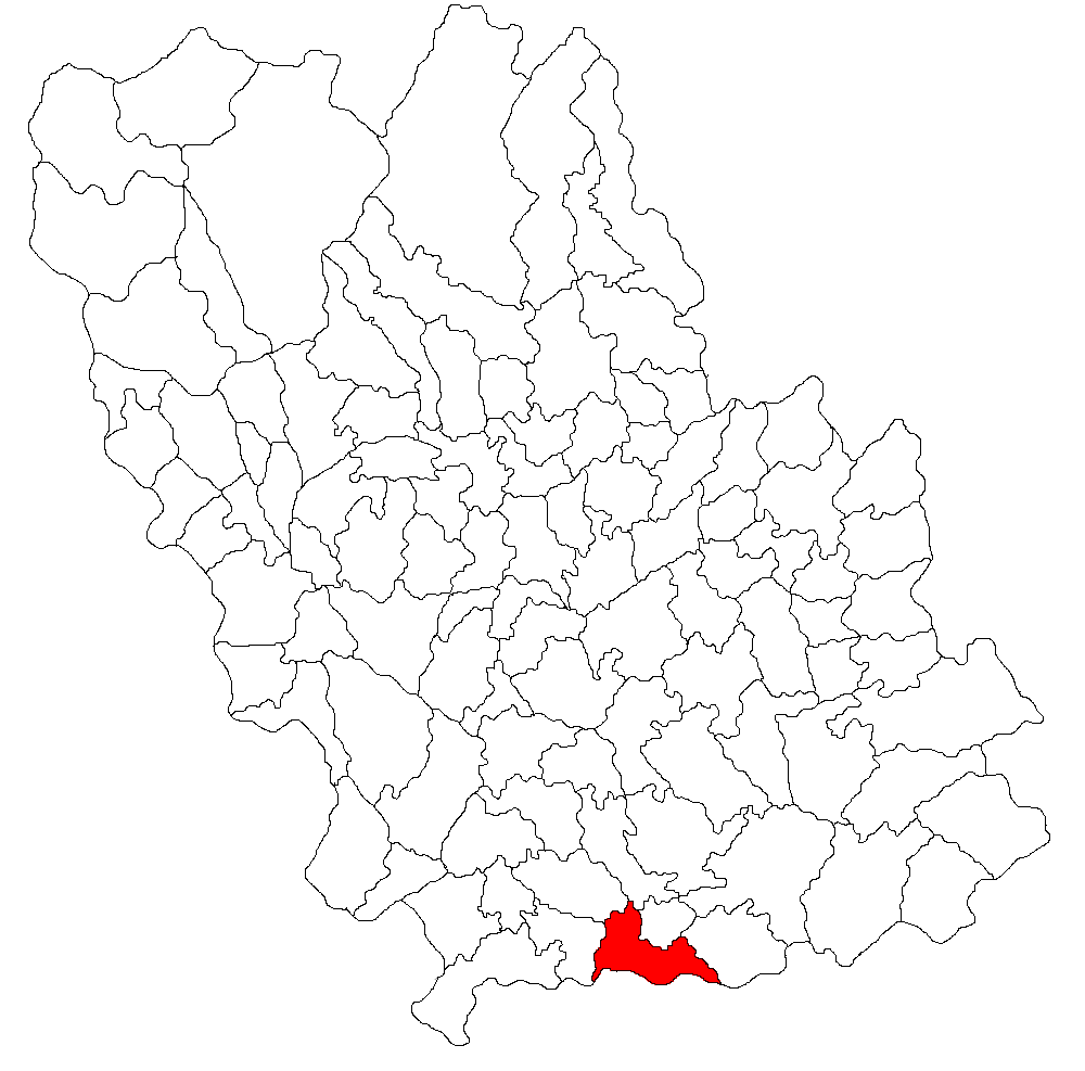 Categorie:Hărţi ale judeţului Prahova